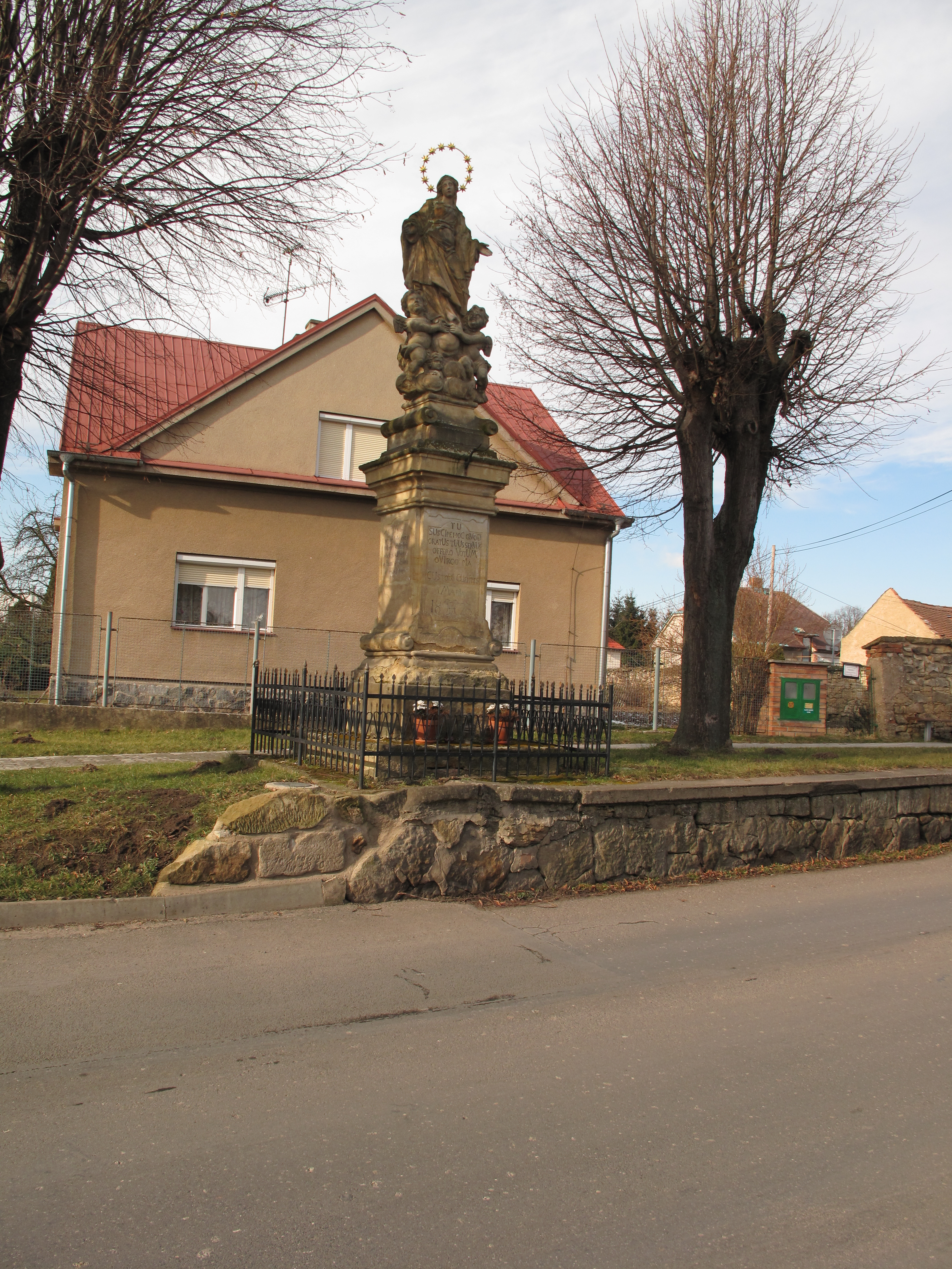 Světec v Řepově. Okres Mladá Boleslav, Česká republika.